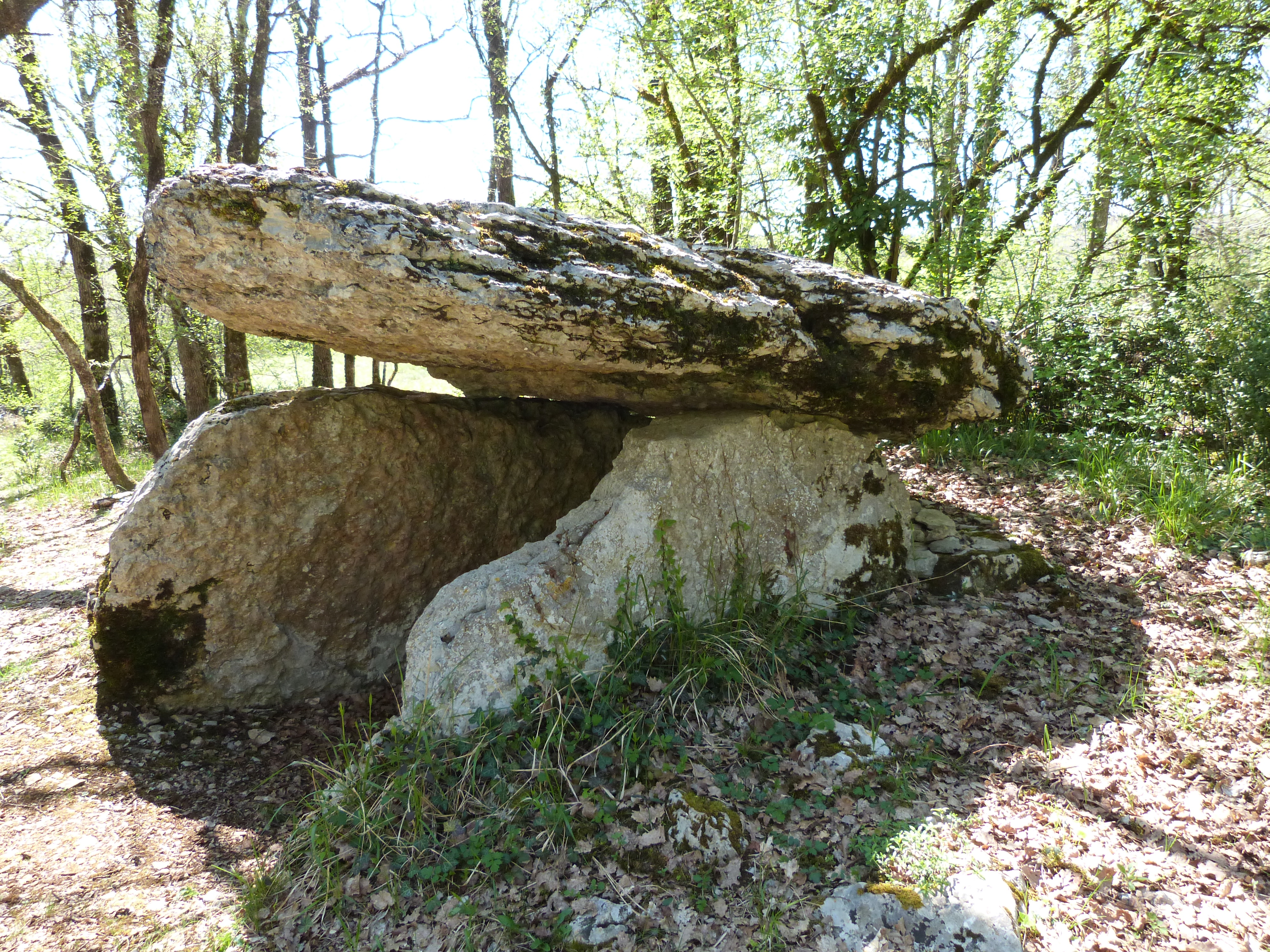 Dolmen de Maire-Gaillard